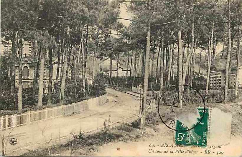 Rues d'Arcachon